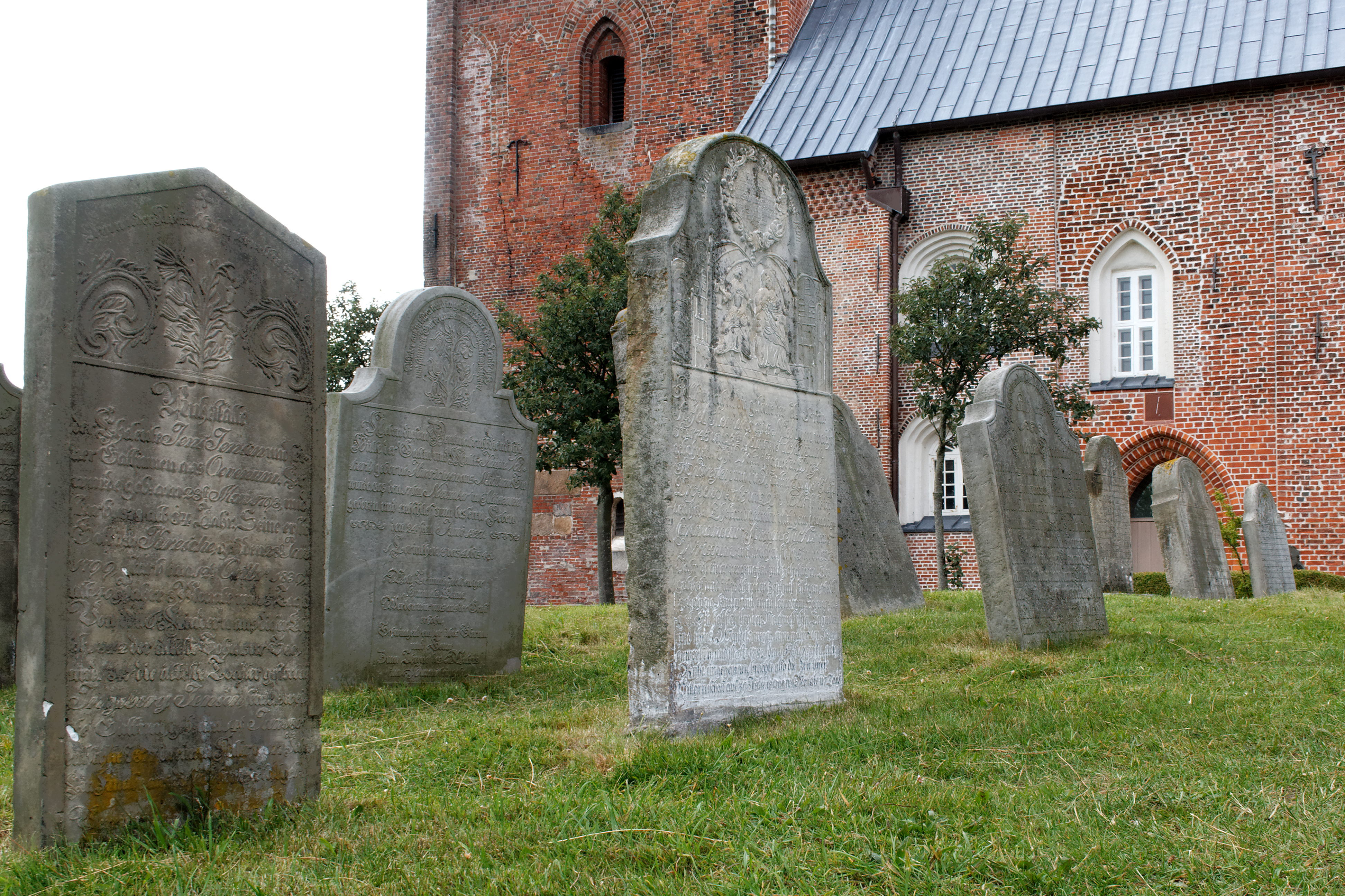 Friedhof der Kirche St. Johannis in Nieblum, Insel Föhr.